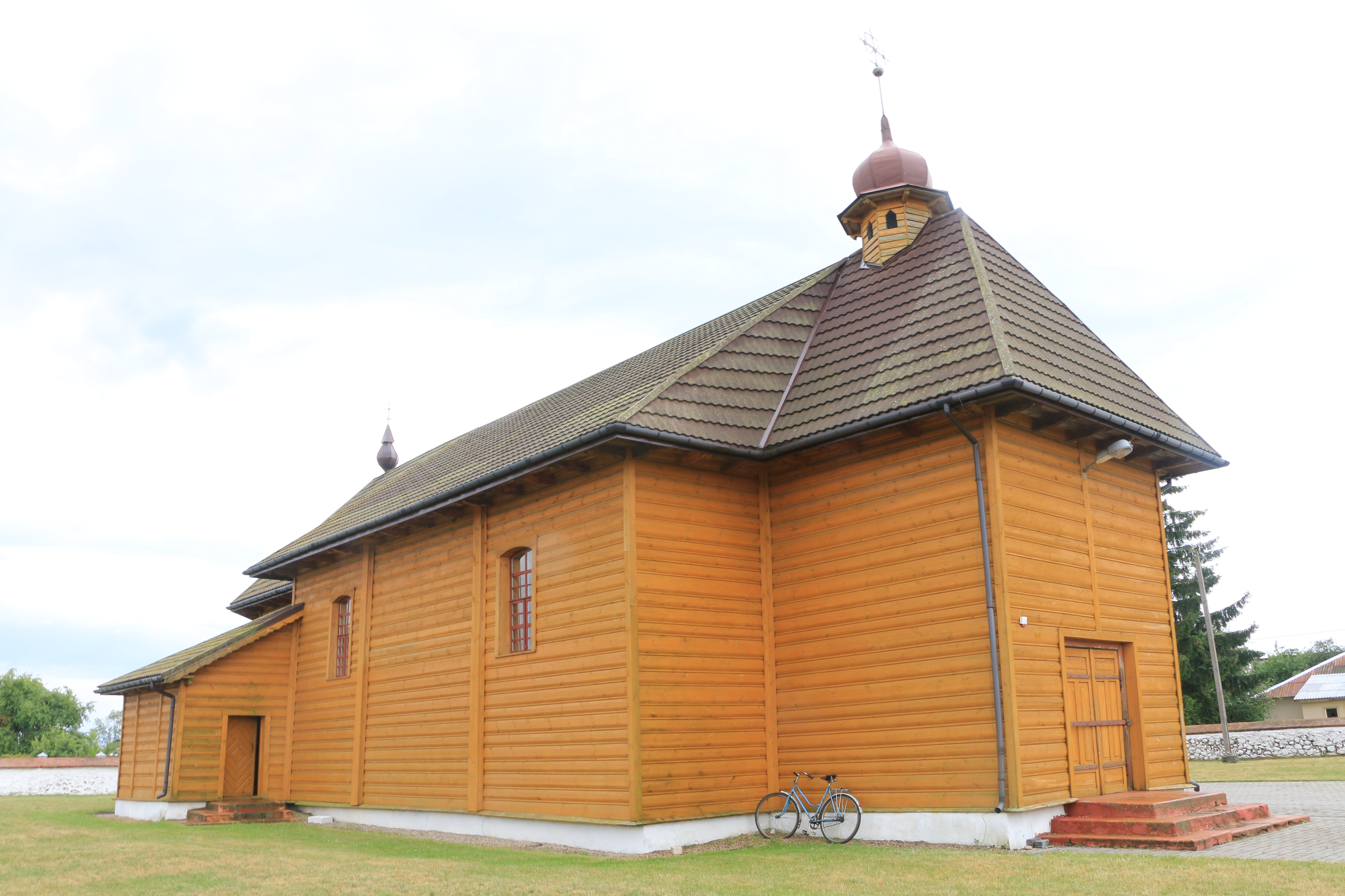 Trakieli, Belarus